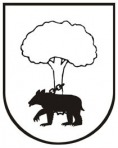 Escudo de Noguera de Albarracín, en Teruel (España)